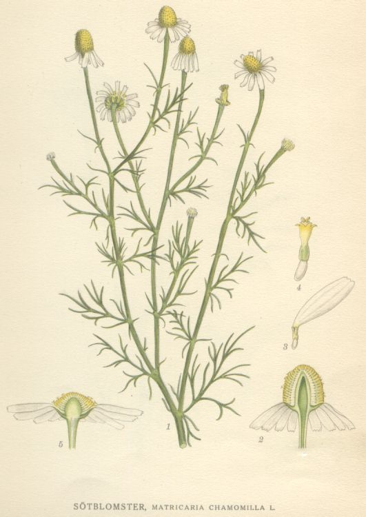 Sötblomster (Matricaria recutita, syn. Matricaria chamomilla) upper part of the plant blomkorg i längdsnitt (2/1) kantblomma (4/1) mittblomma (6/1) blomkorg i längdsnitt av Matricaria inodora.